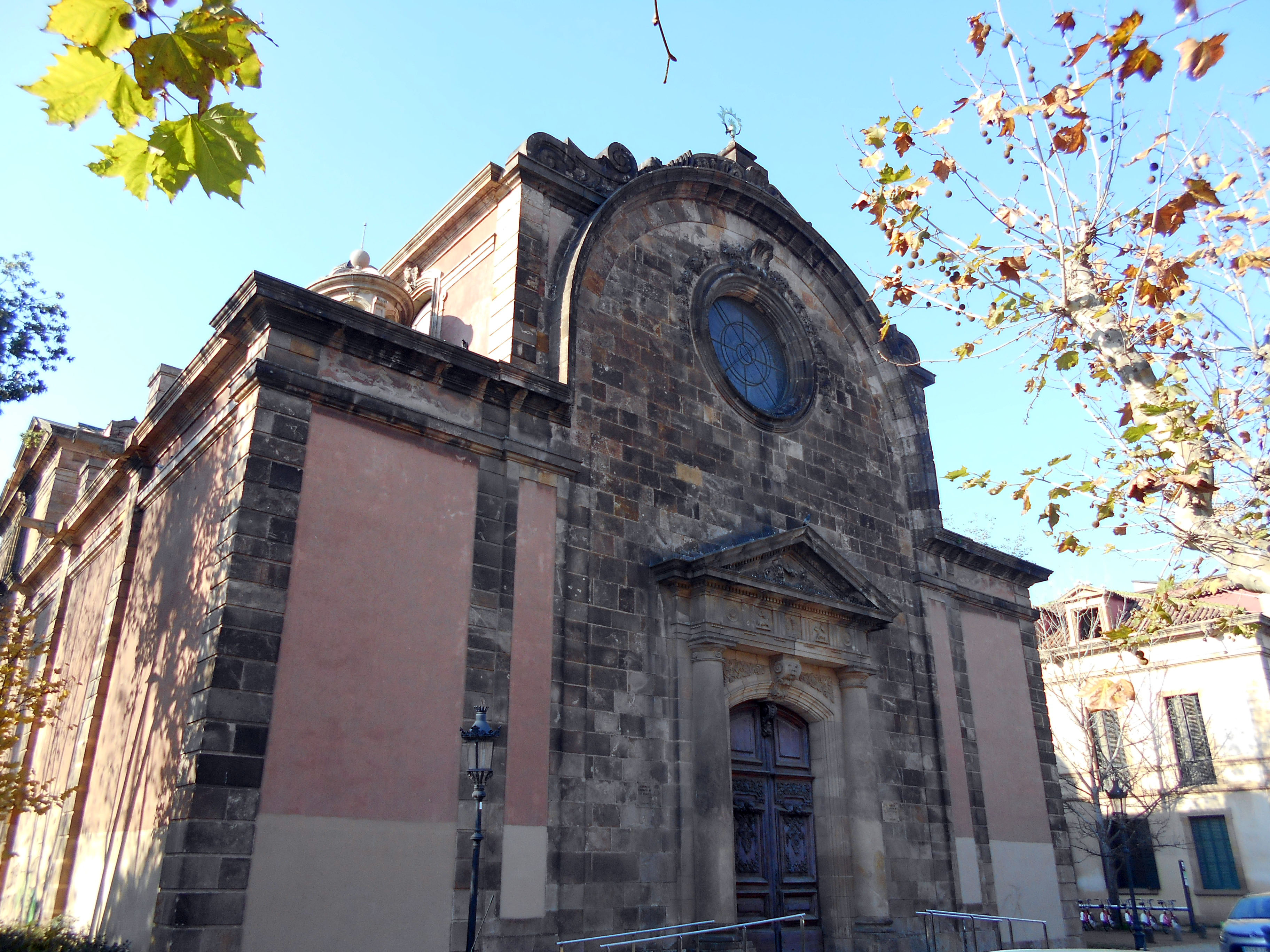 Capilla Castrense de Barcelona.